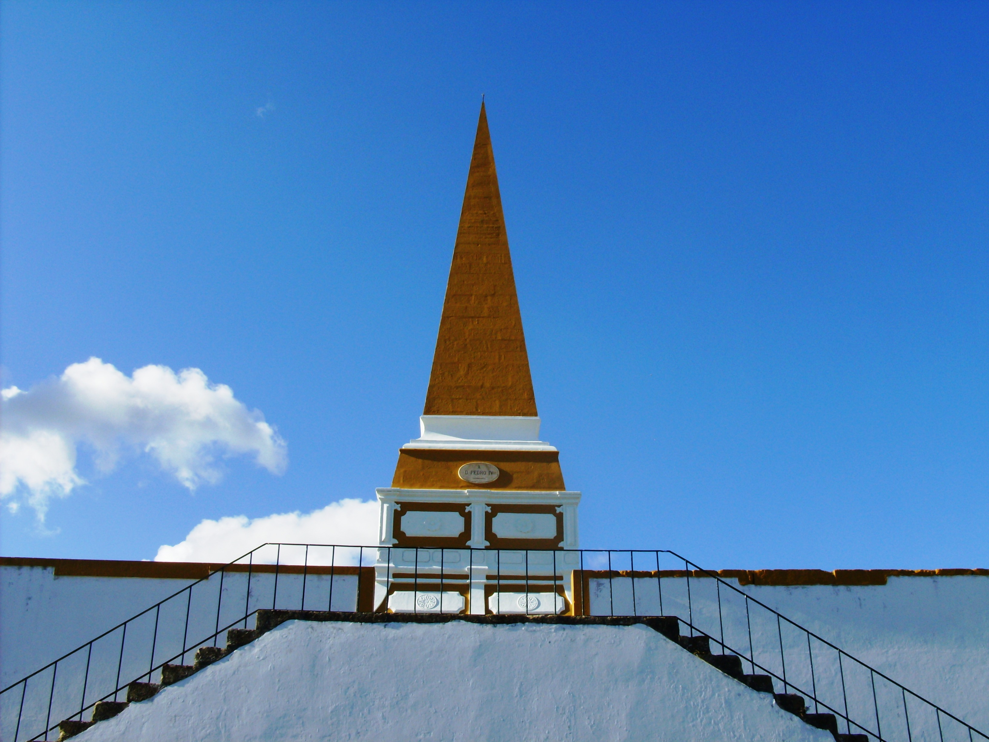 Alto da Memória, Angra do Heroísmo, Ilha Terceira, Açores: acesso pelo Jardim Duque da Terceira.